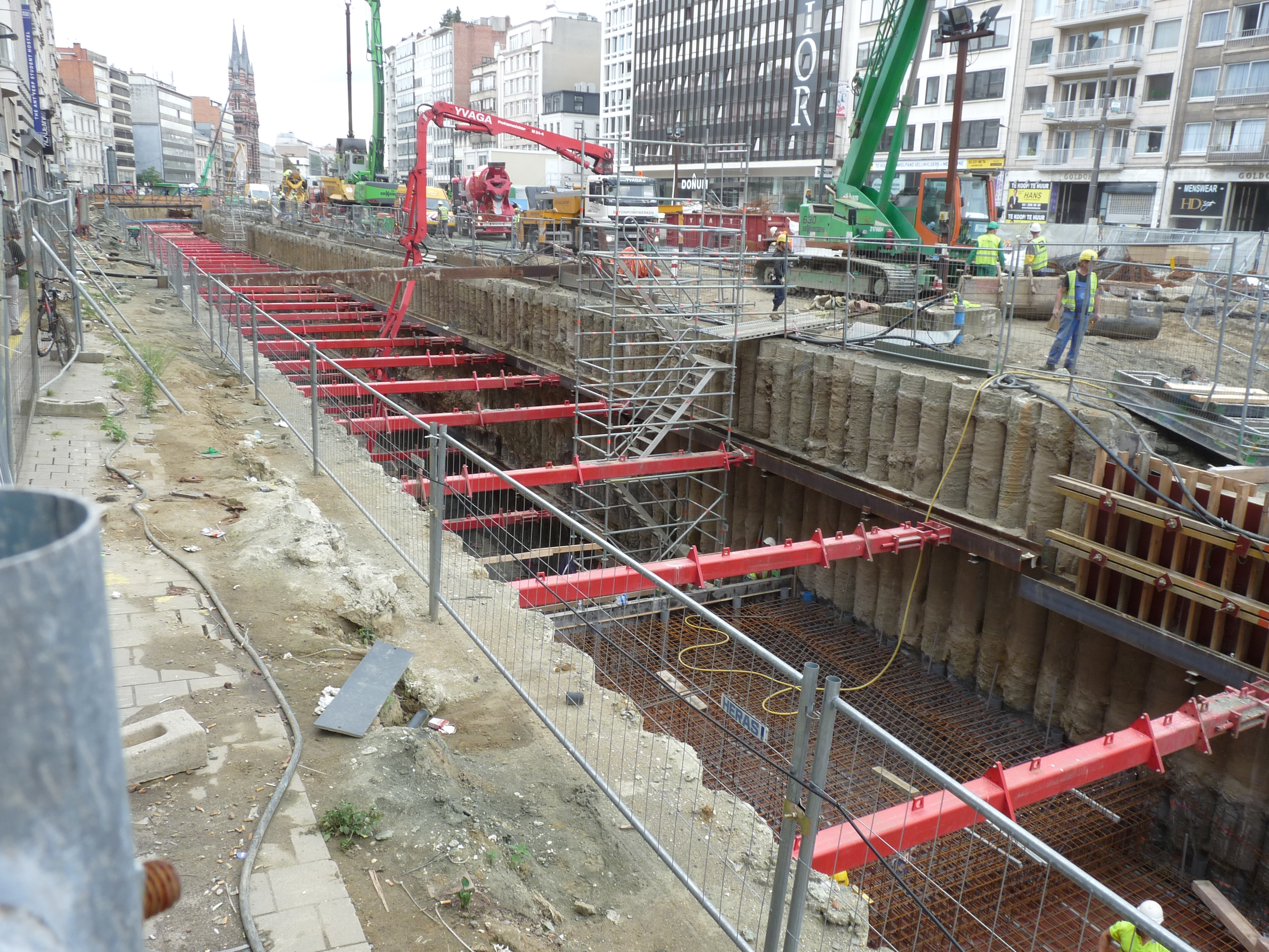 De werkzaamheden voor de toekomstige tramhelling in Frankrijklei. Gezien richting Zuiden